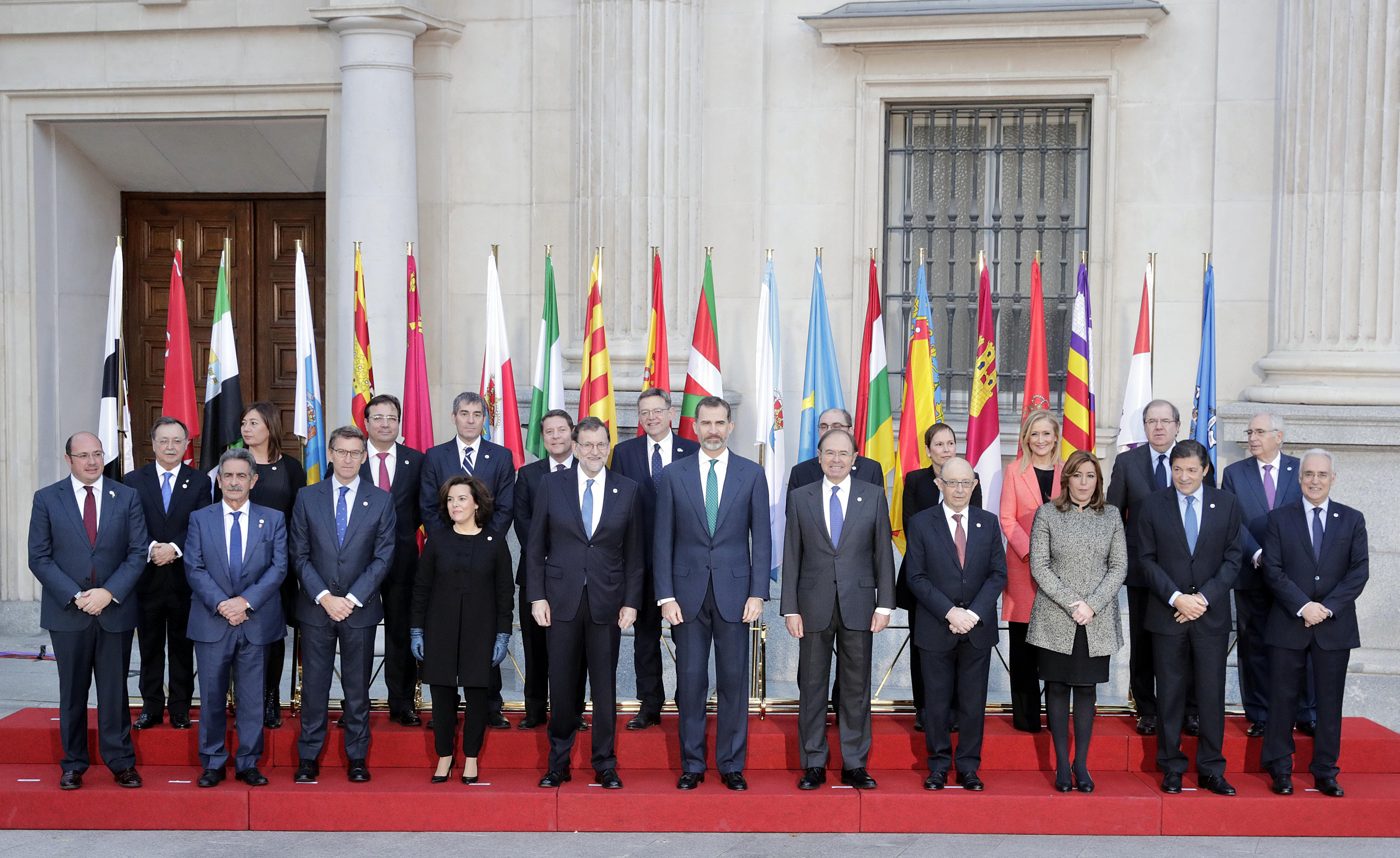 Hoy durante la #ConferenciaPresidentes he expresado las dos cuestiones que para mi gobierno son prioritarias, por un lado la necesidad de nuevo sistema de financiación autonómico, el cual debe ser sencillo, negociado, y aprobado con el mayor consenso posible, para que tenga vocación de permanencia; y por otro corregir la financiación de la dependencia, dado que nuestro caso el 84% del gasto destinado a este concepto lo aporta la Comunidad de Madrid, frente al 16% del Estado, siendo esta la asignatura pendiente del Estado del Bienestar, sin olvidarnos de otras cuestiones relevantes como el transporte público, la renta mínima o la sanidad, en este caso a través de un gran pacto nacional.